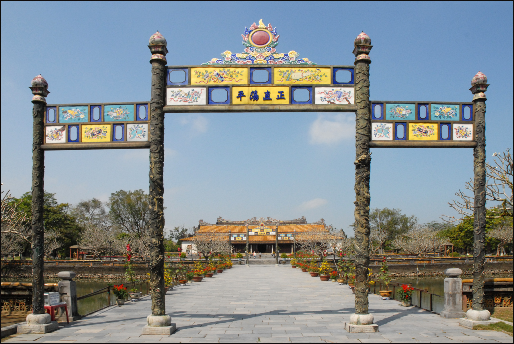 Vue du grand parc, du pont aux Eaux dorées qui passe au-dessus de l'étang et de la cour des Cérémonies (Dai Trieu Nghi) qui se trouve devant le palais de l'Harmonie Suprême (Dien Thai Hoa) situé au fond.